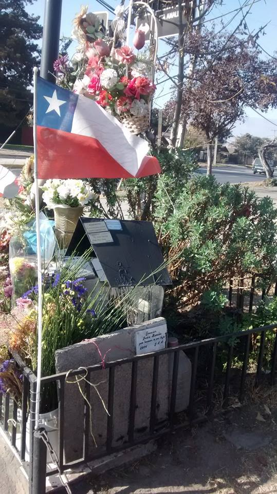 Animita del Carabinero Juan Ramón Morales, muerto en accidente de tránsito en la Calle Santa Amalia con Colombia en la Comuna de La Florida en Chile. Lugar de culto extra católico.